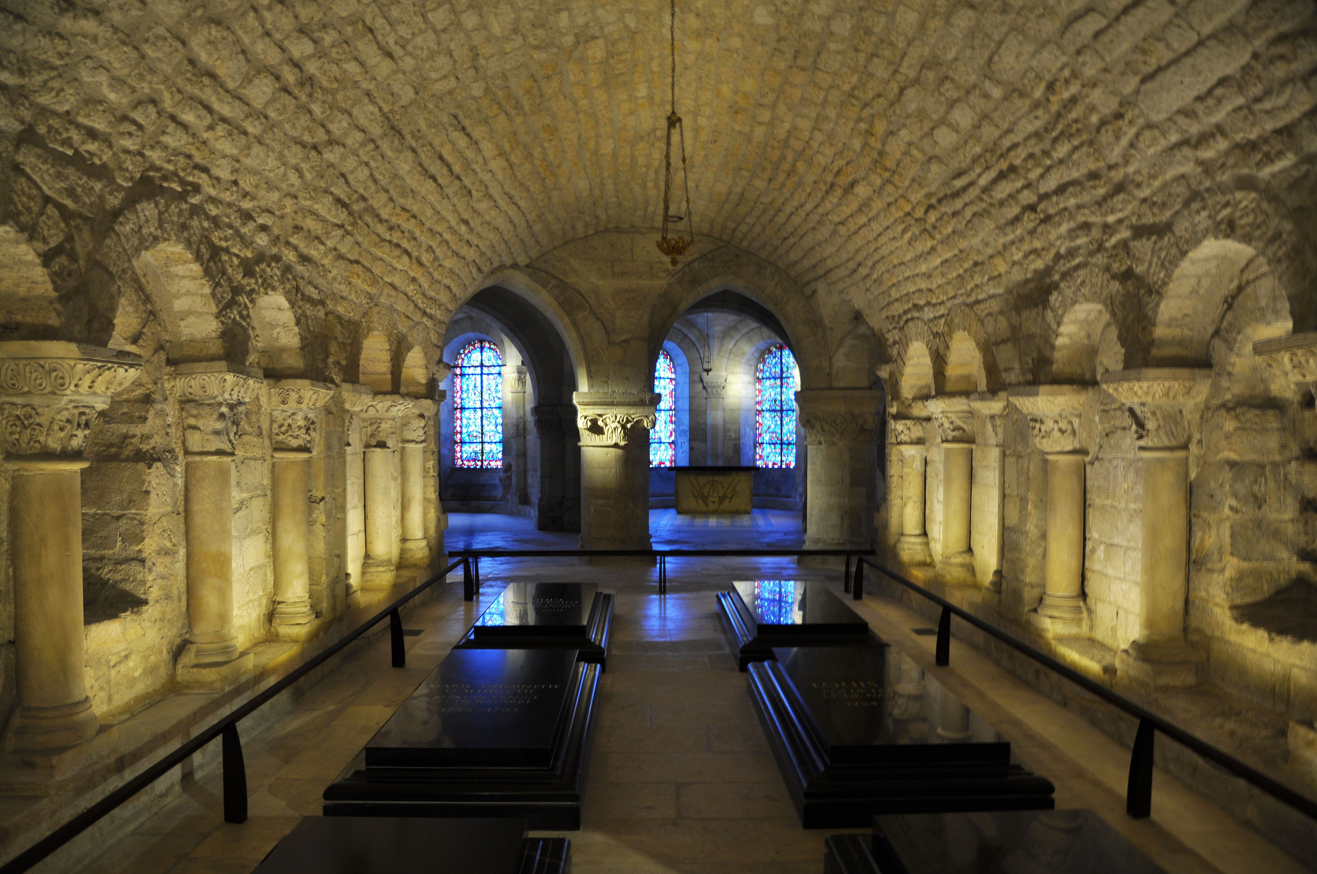 Crypte, caveau des Bourbons à la basilique Saint-Denis.